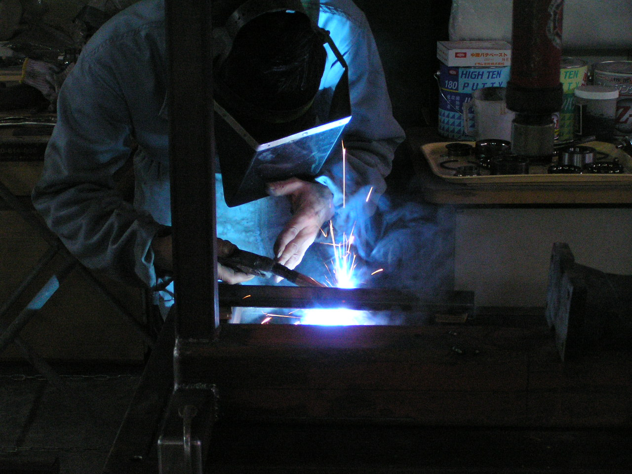 大阪の町工場の板金職人